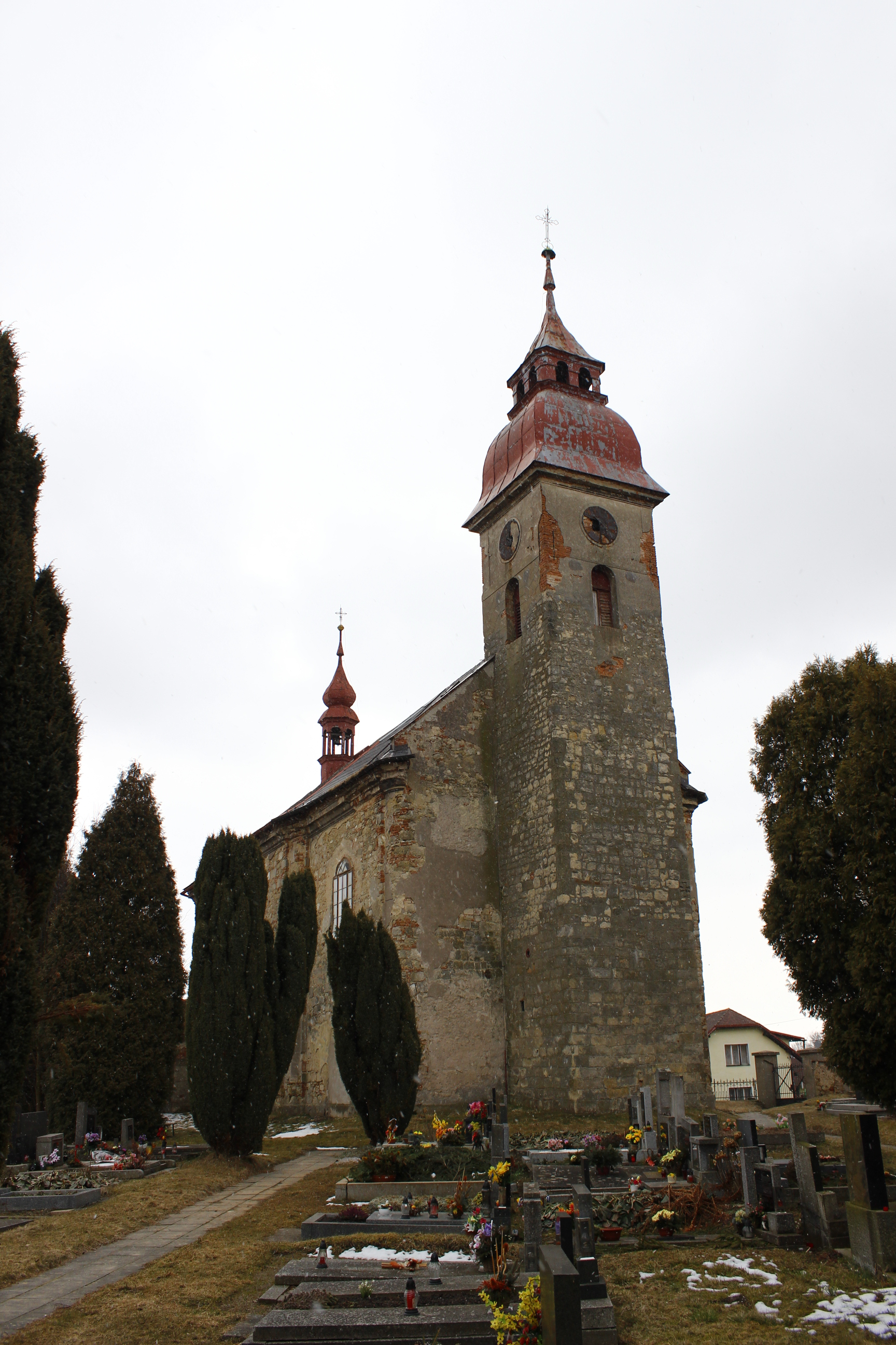 Kostel svatého Františka Serafinského v Kováni.